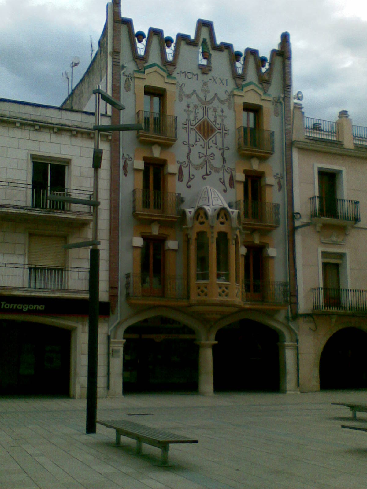 La Casa de la Feligresa (Ulldecona, comarca del Montsià)